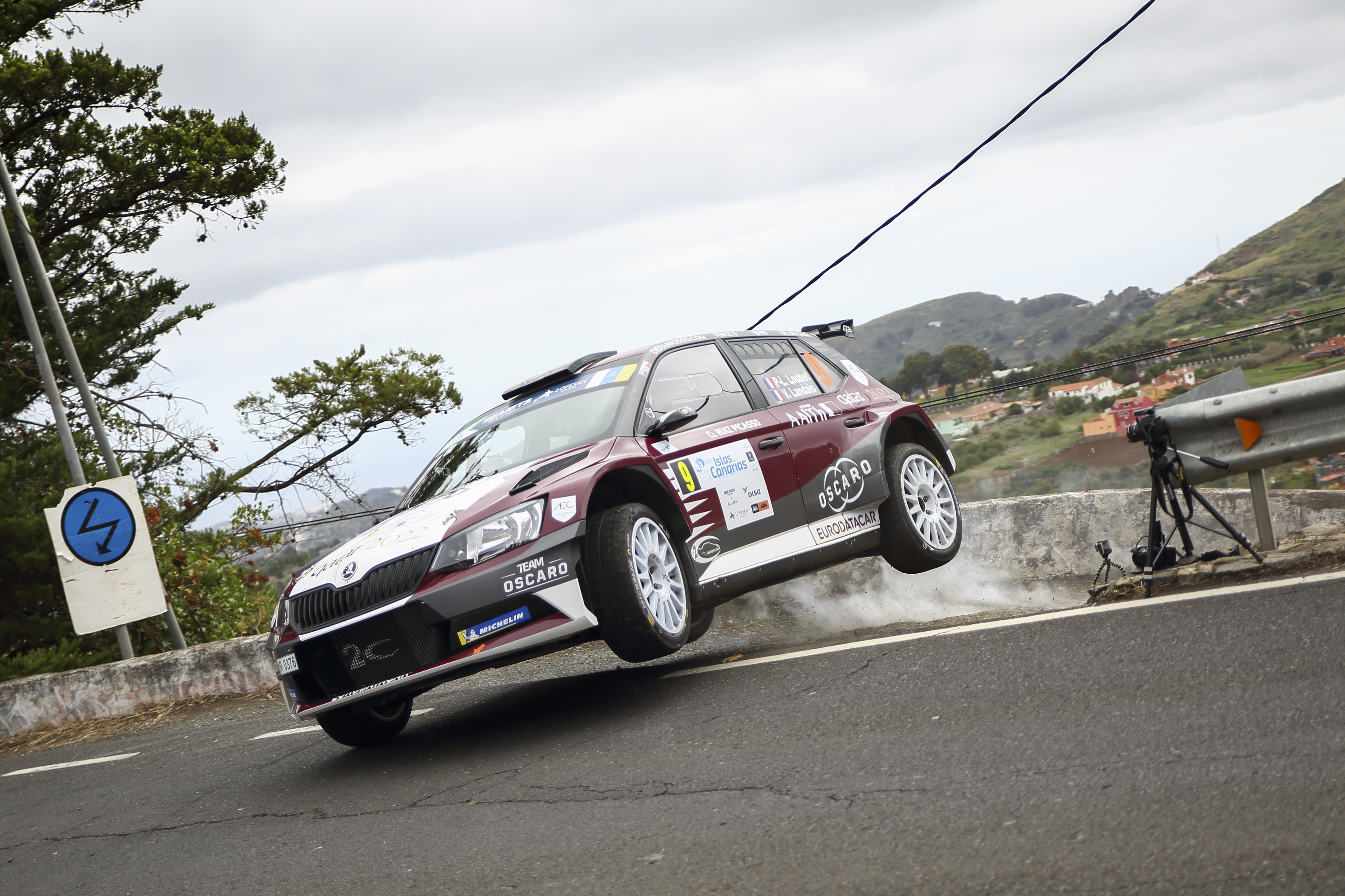 La isla de Gran Canaria volvió a ser, entre los días 2 y 4 de mayo de 2019, punto de encuentro de algunos de los mejores equipos de rallies. Una vez más, el Rally Islas Canarias repitió como la segunda cita de un calendario de ocho pruebas del FIA European Rally Championship, el segundo certamen internacional más importante de esta especialidad.